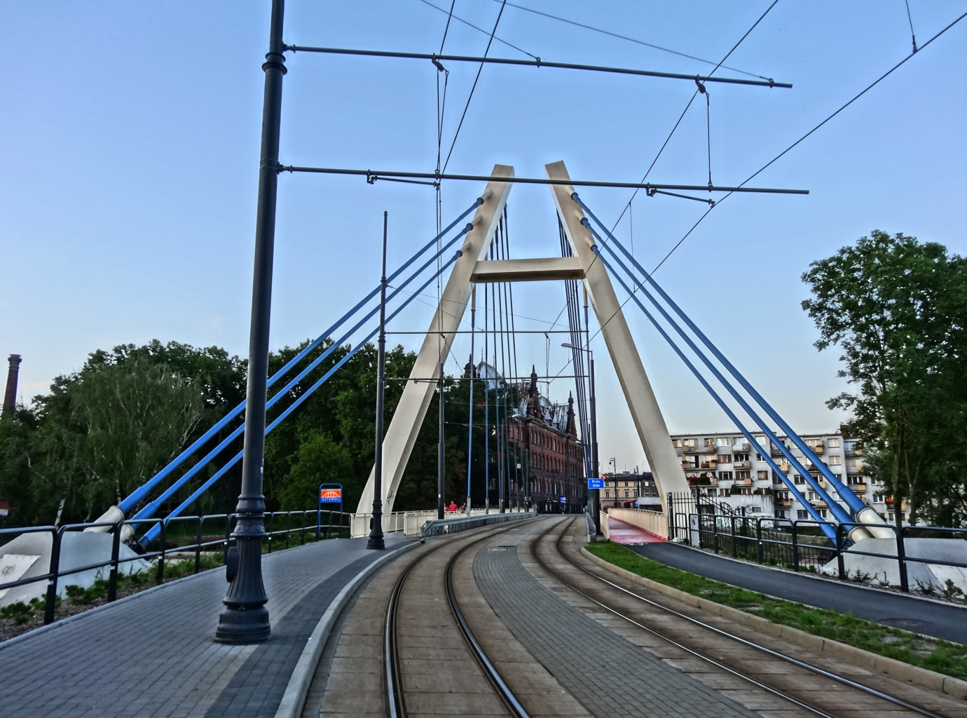 Most tramwajowy im. Władysława Jagiełły nad Brdą w Bydgoszczy